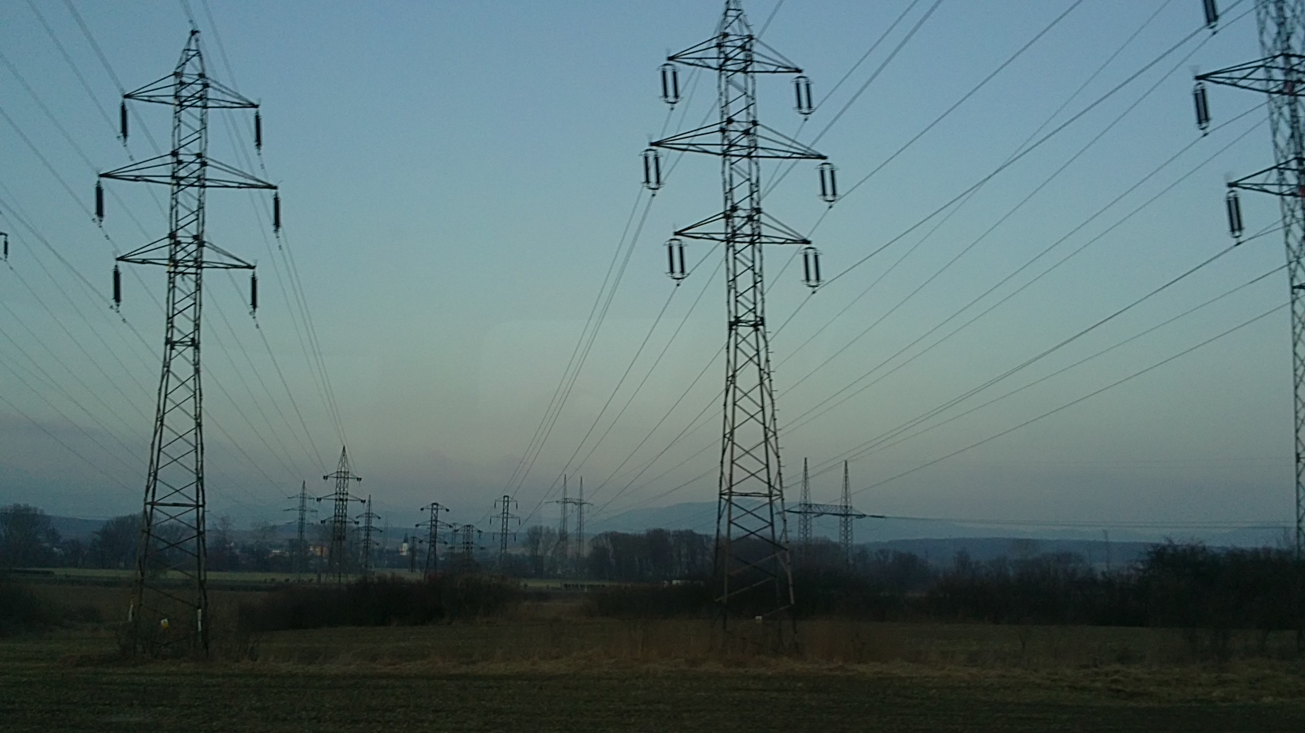 Vedenie pred rozvodňou Lemešany.